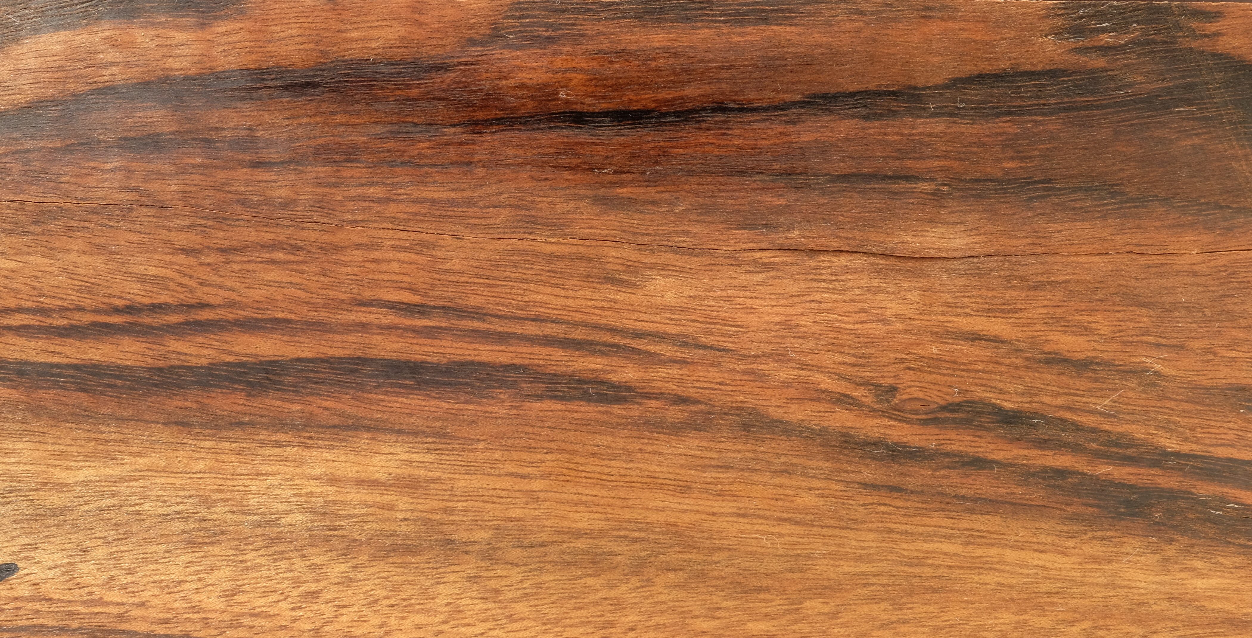 gemessertes Furnier; Holzart: Goncalo alves, Tigerwood